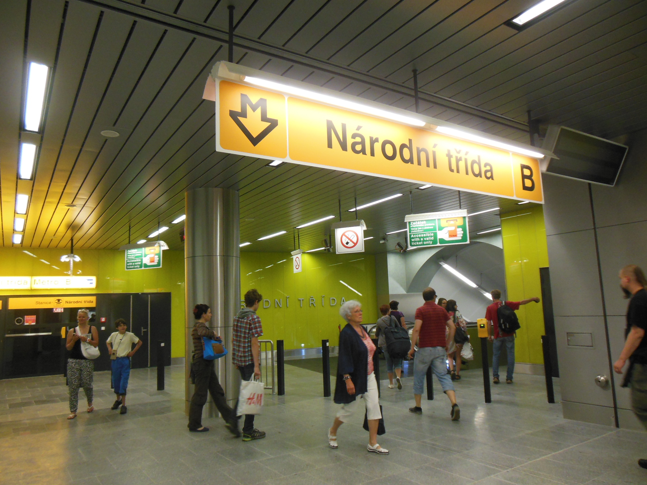 Praha-Nové Město. Stanice metra B Národní třída, stav po rekonstrukci 2012-2014, mezipatro.